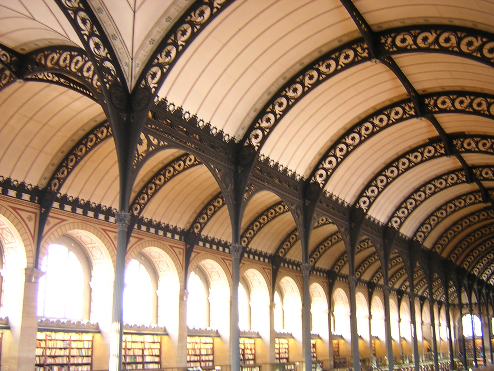 Intérieur de la bibliothèque Saint-Geneviève à Paris, France